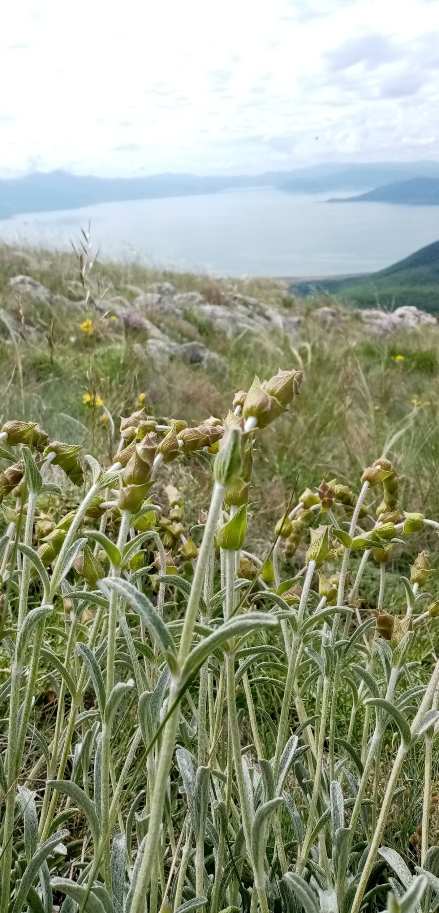 Планински чај